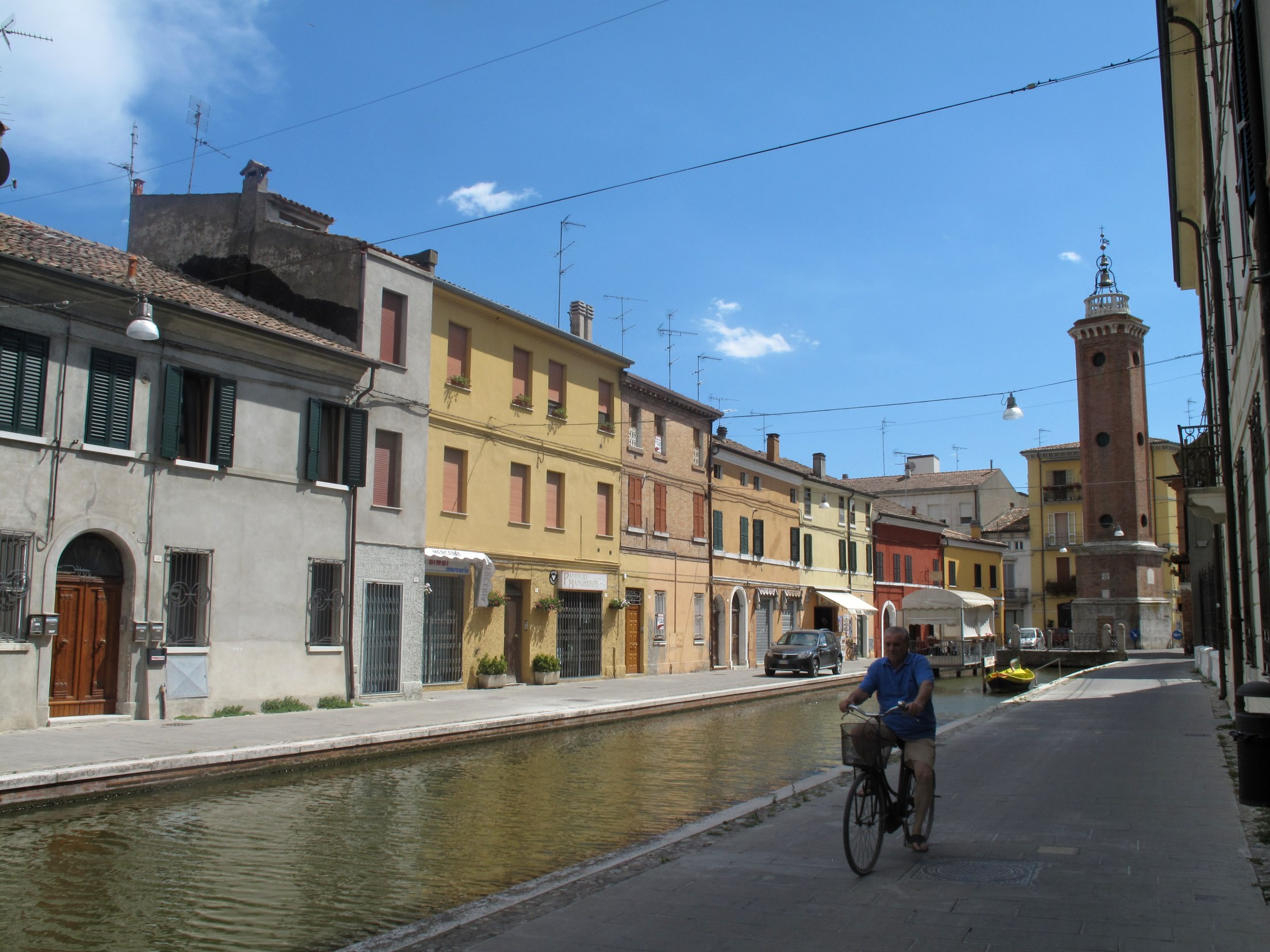 visite juillet 2010